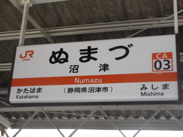 沼津駅(東海道本線・静岡地区)の駅名標（駅番号付き）